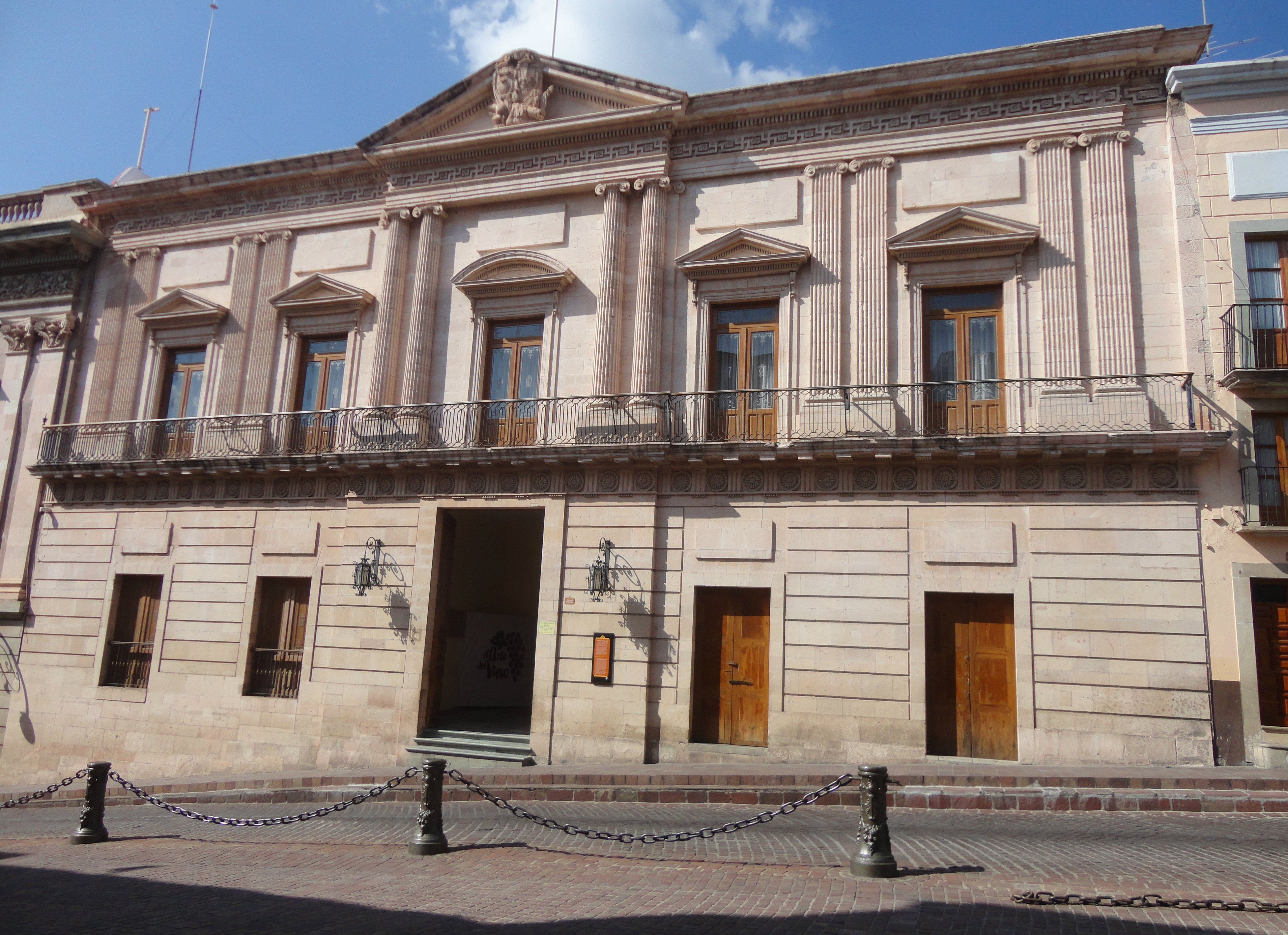 Casa del Conde Rul y Valencia, Guanajuato Capital, Guanajuato, México.